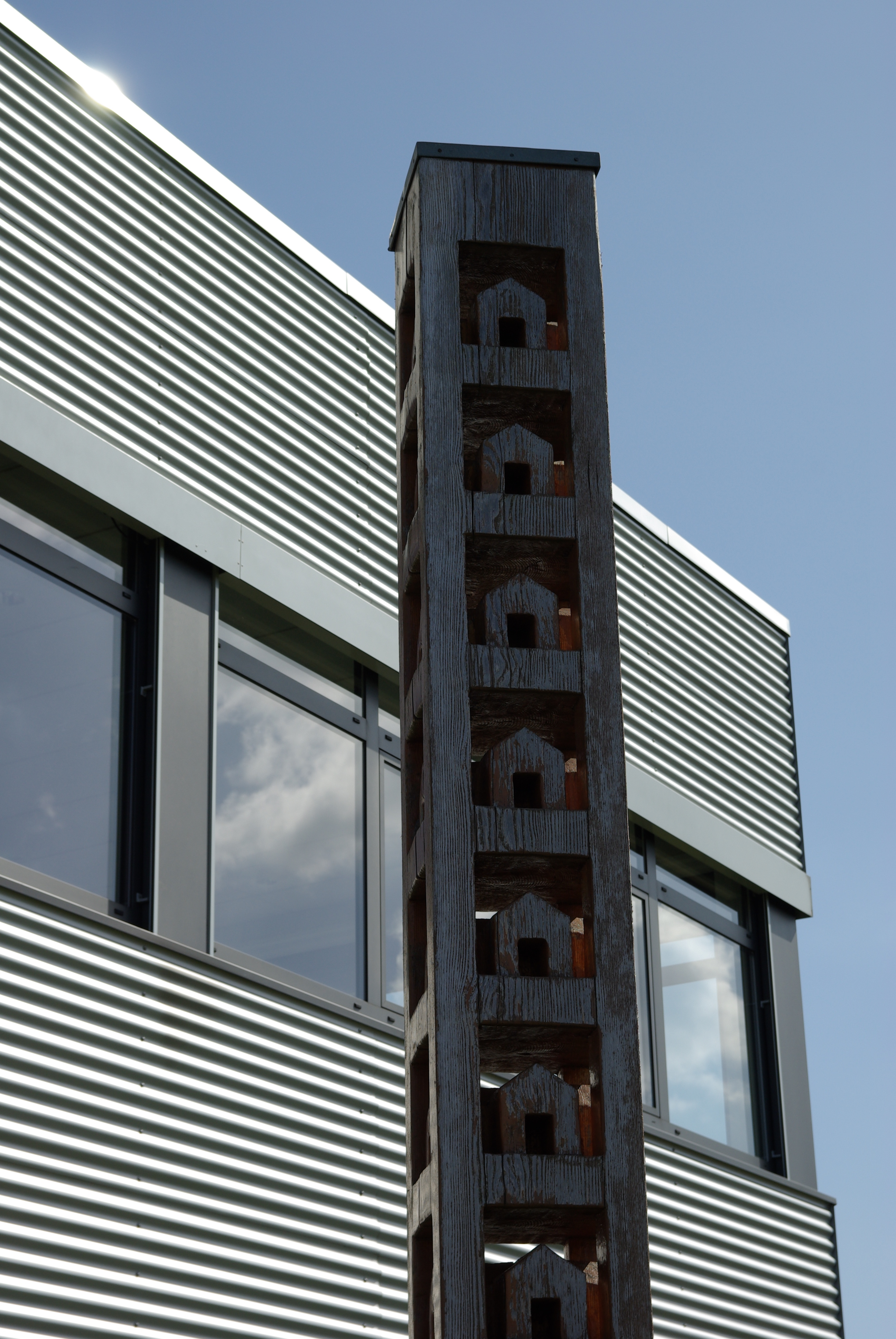 44 Optionen. 2000. Douglasienstamm, 500 x 45 x 45 cm. Standort: Ahlen